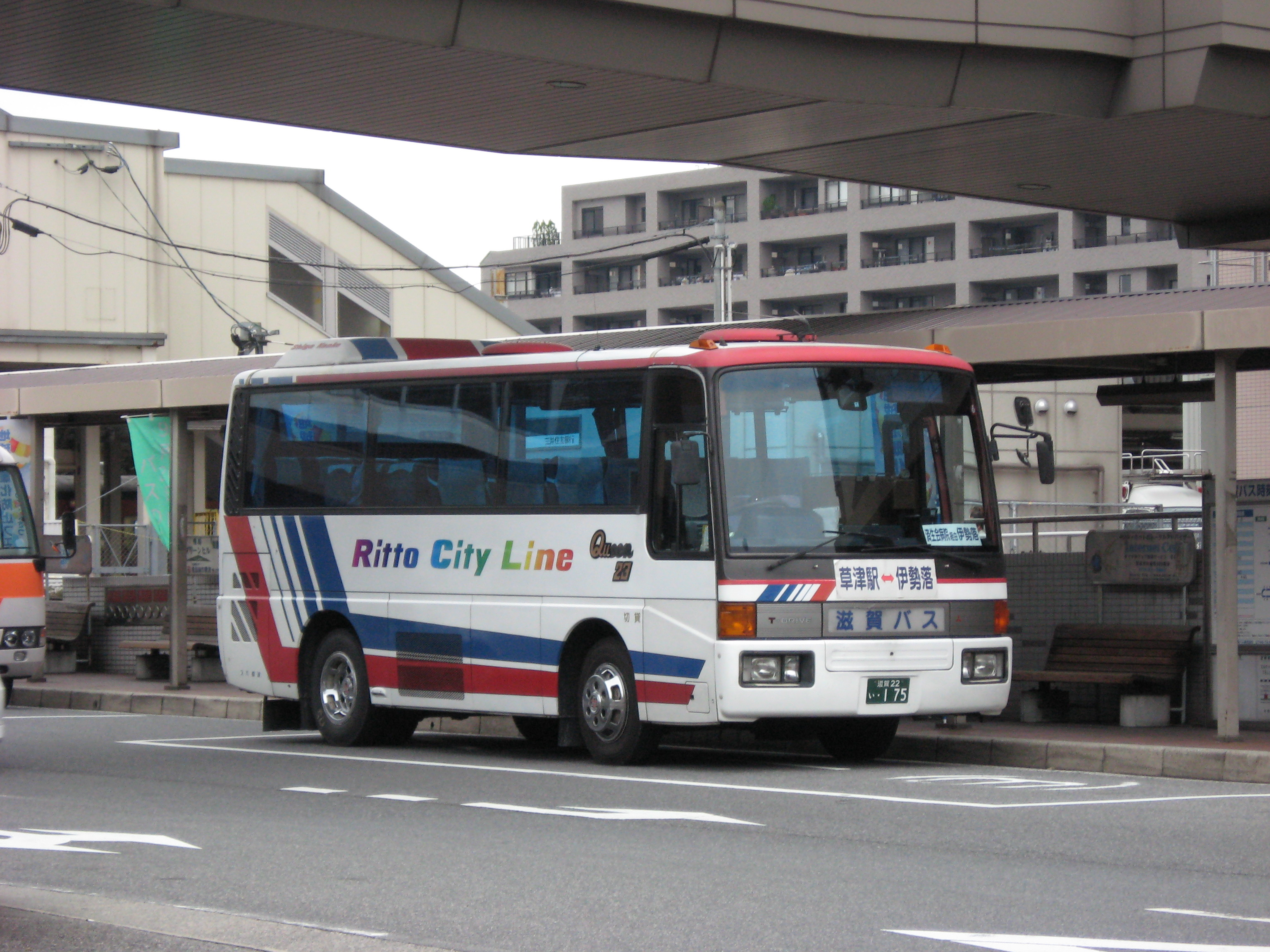 Shiga Bus 0175 (Shiga 22 i 0175)